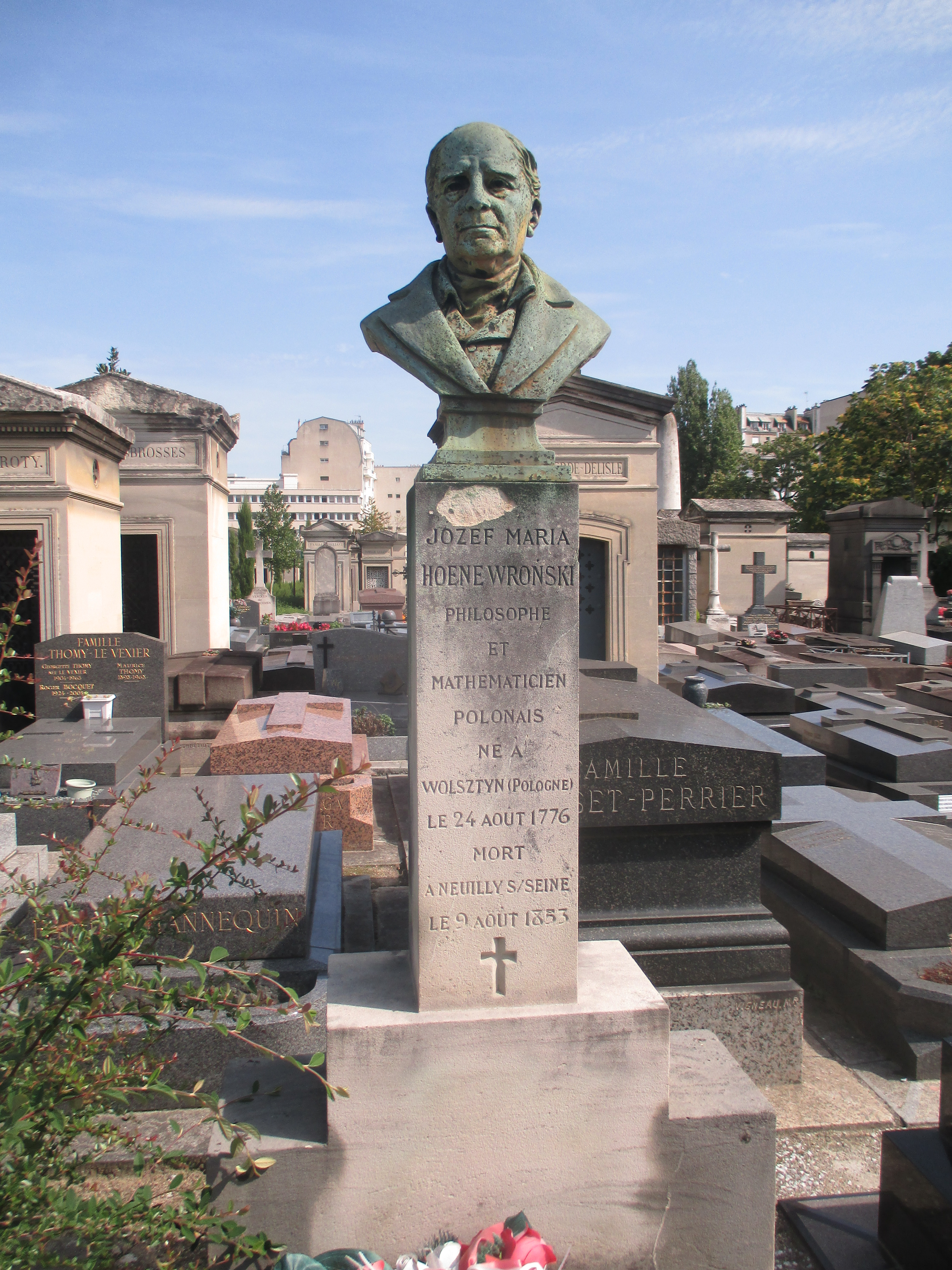 Buste de la sépulture de Jozef Hoene-Wronski au cimetière de Neuilly.